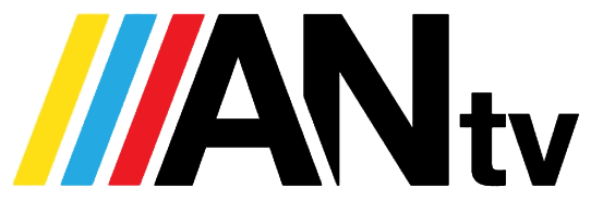 Emblema de ANTV en 2016.